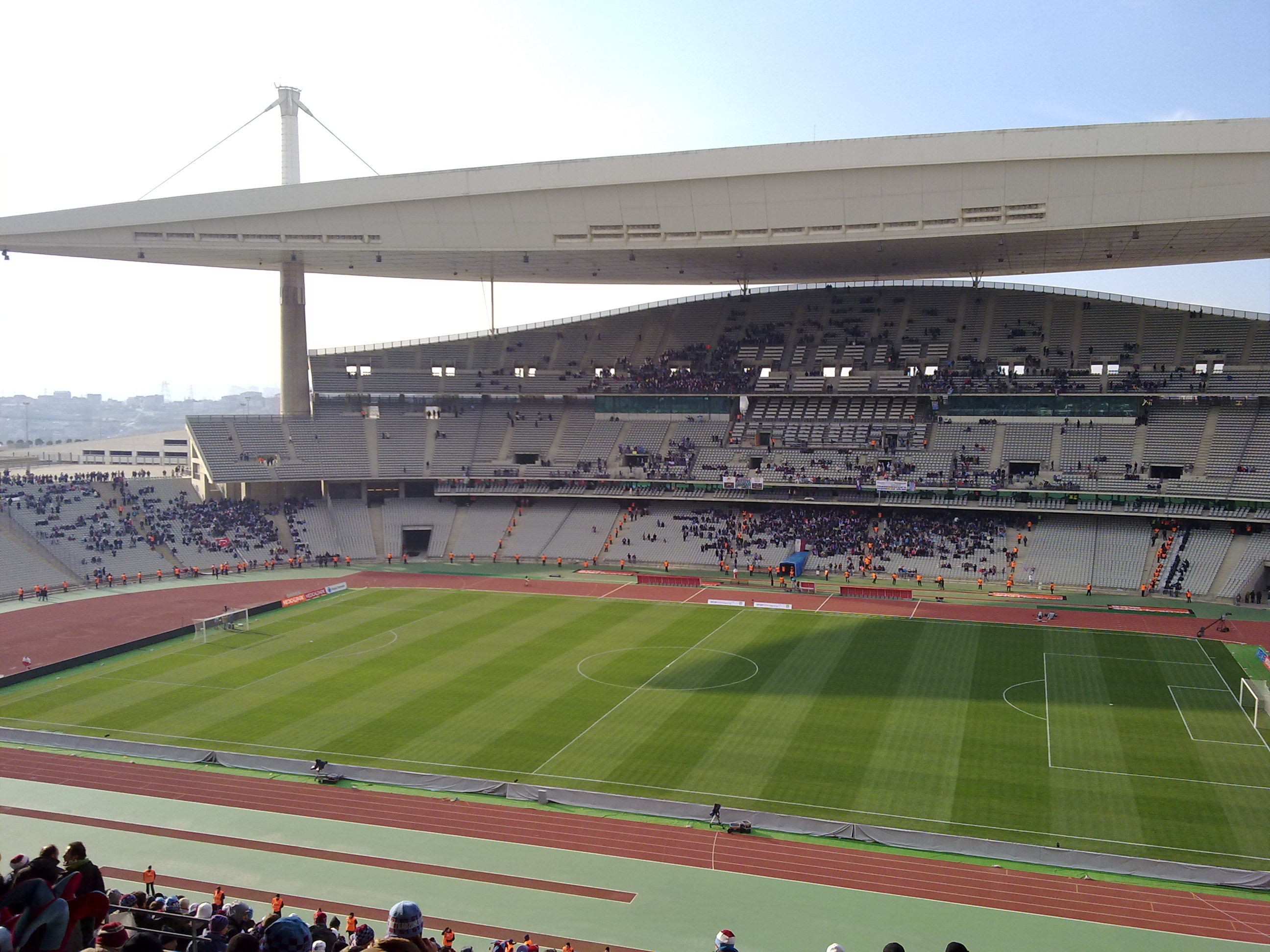 Atatürk Olimpiyat Stadı batı tribününden bir görünüm